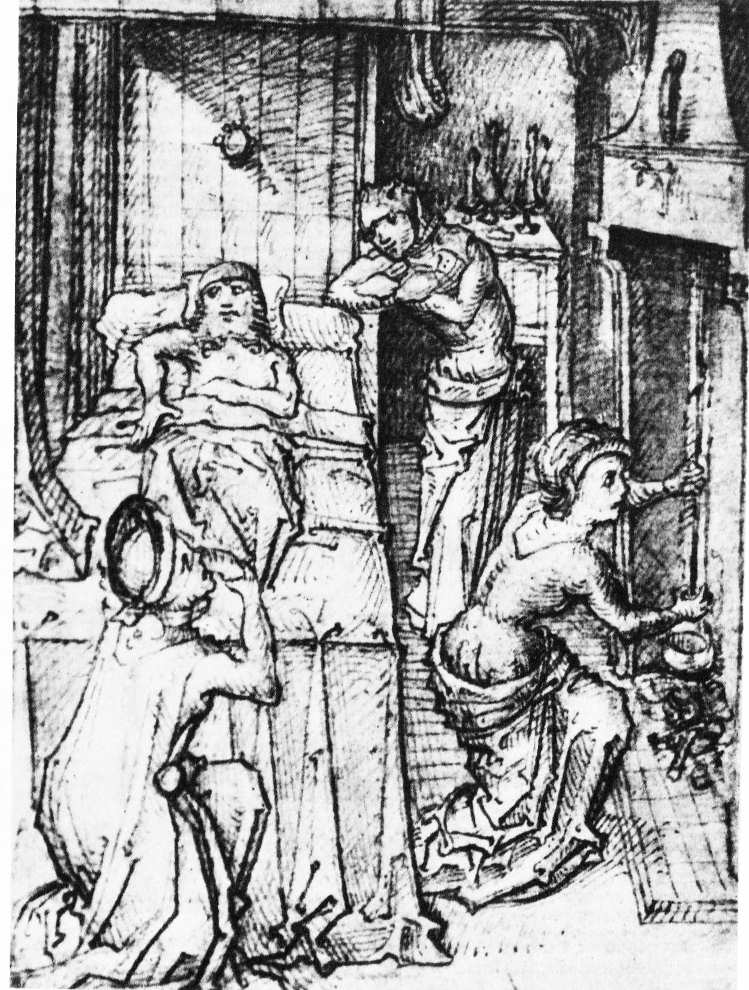 Eustache Marcadé Passion Arras 1430 Lazarus